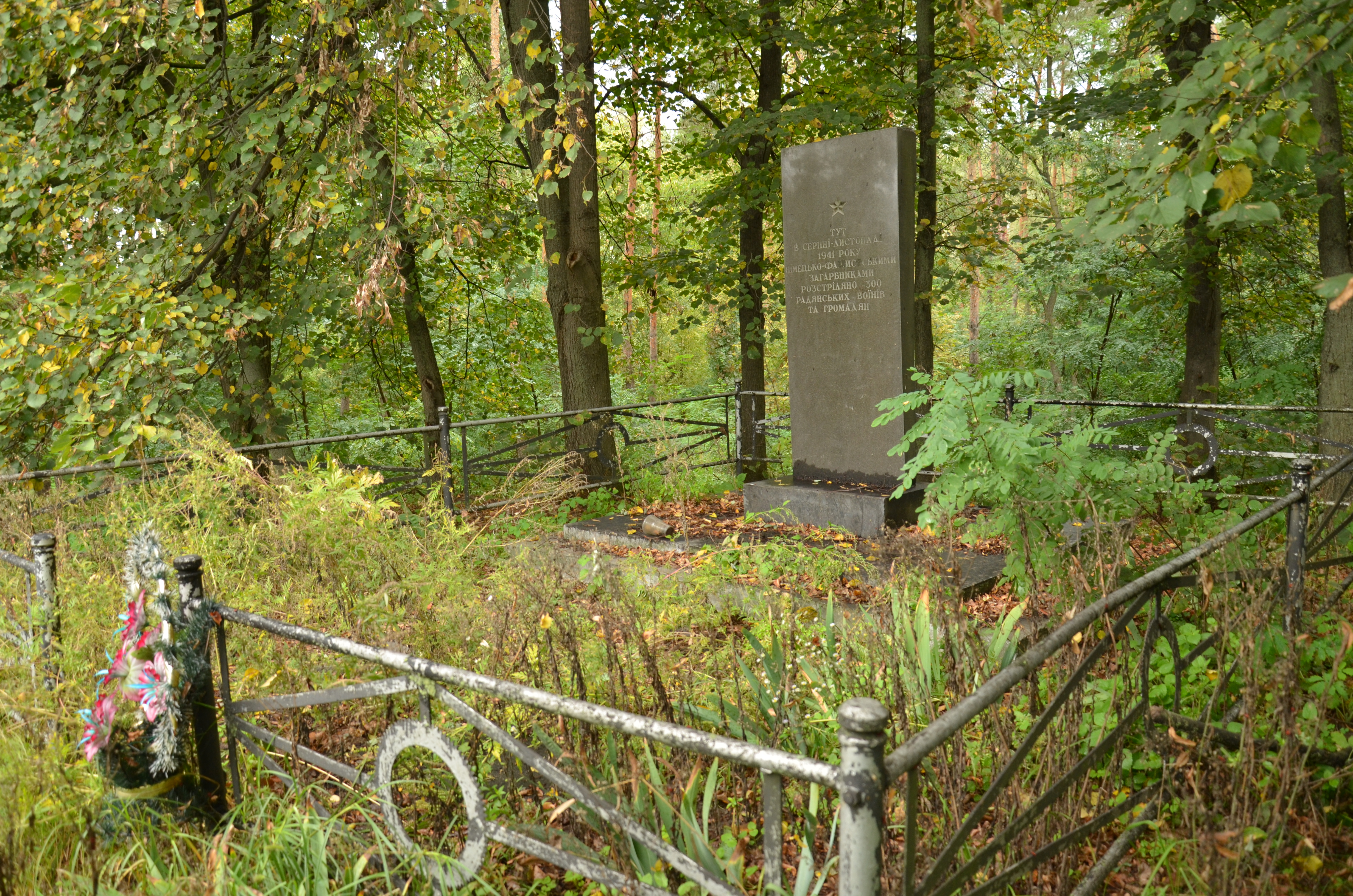 Пам'ятний знак на місці розстрілу фашистами воїнів Радянської Армії та мирних громадян у серпні-листопаді 1941 року, село Бузова, по Житомирському шосе